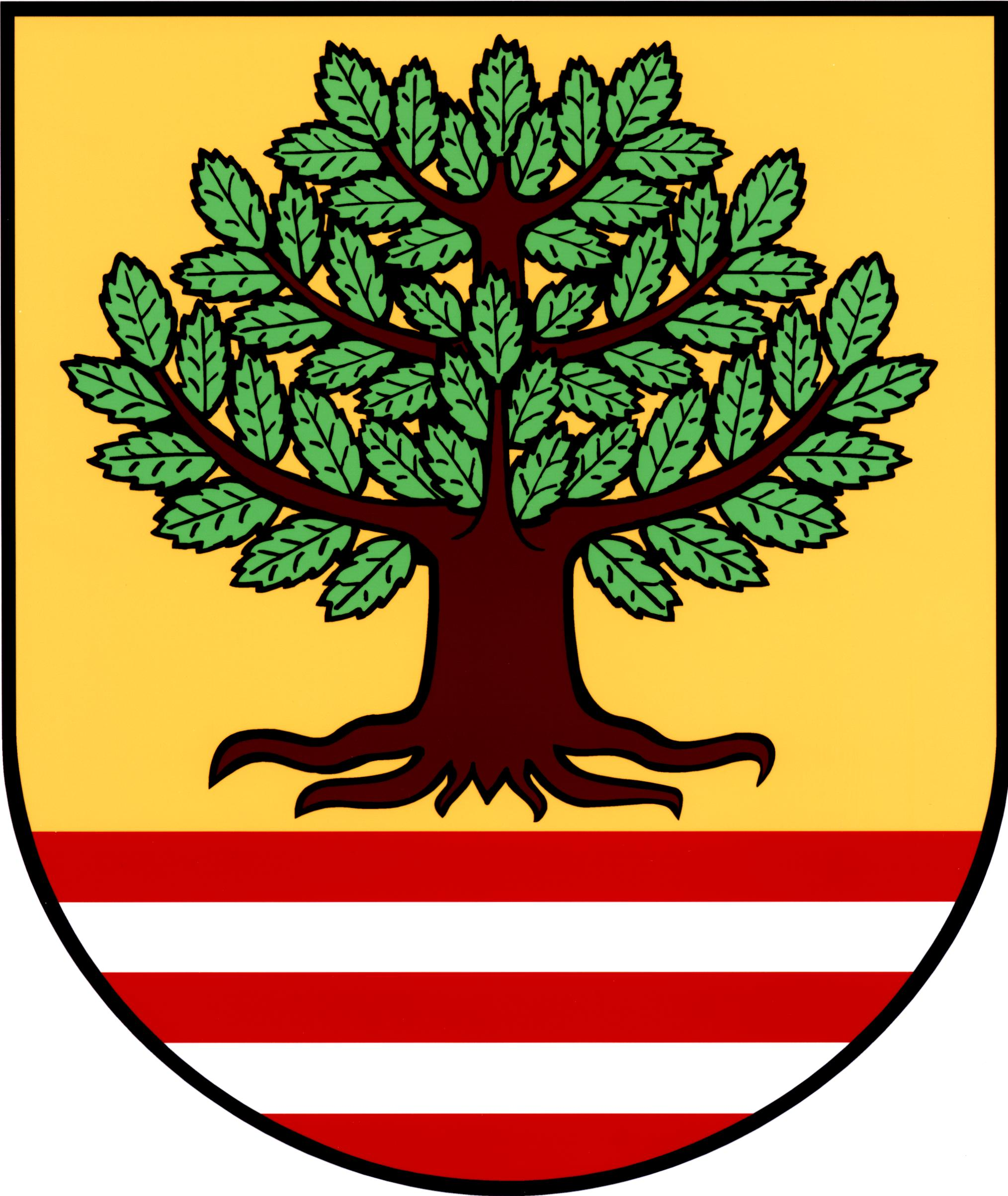 Znak obce Horní Bukovina